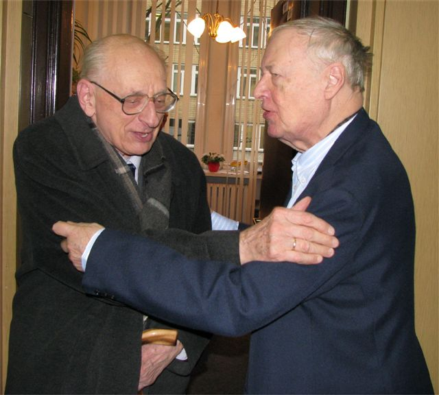 Maciej Morawski (b. September 20, 1929), Polish journalist and publicist and Władysław Bartoszewski (1922-2015), Polish historian and politician